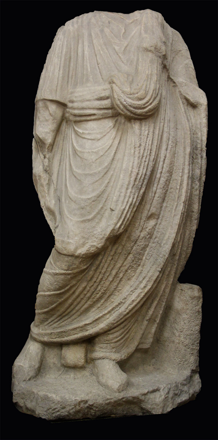 Statue gallo-romaine trouvée sur le site funéraire de Sendac, zone collinaire de Lézignan près de Bourréac, dans les Hautes-Pyrénées (Midi-Pyrénées, France). Déposée au musée du Jardin Massey à Tarbes